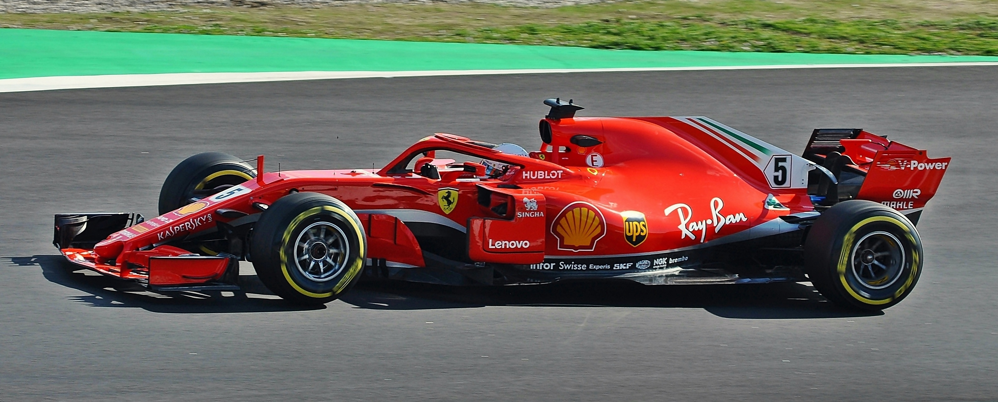 Ferrari SF71H-Circuit de Barcelona